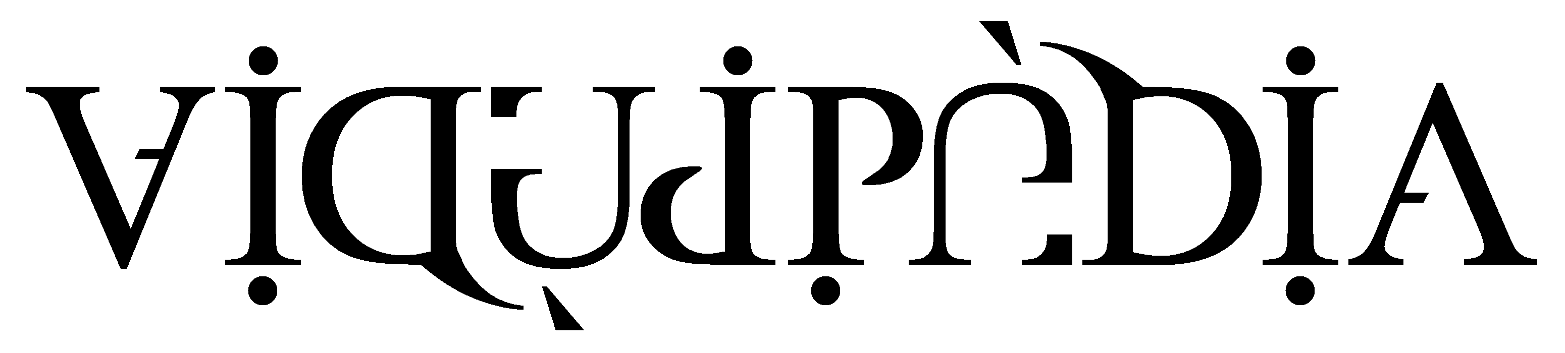 Ambigrama de la paraula Viquipèdia.